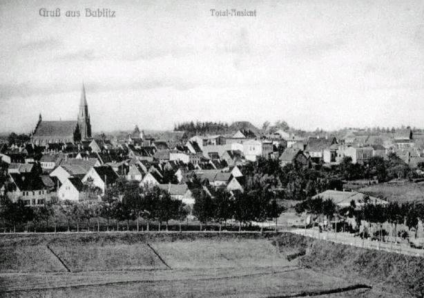 Bublitz (Pommern) about 1900